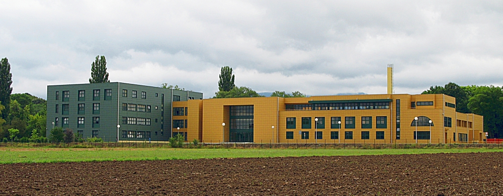 Šumarski fakultet u Zagrebu